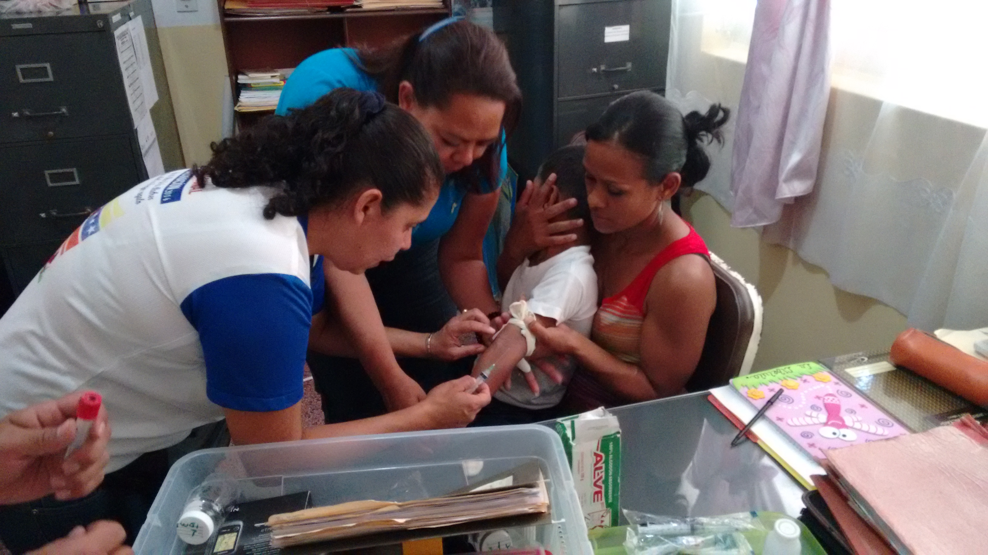 Toma de muestra de sangre de los vigilantes entomológicos comunitarios para su diagnóstico de Chagas.Chiguará-Mérida.